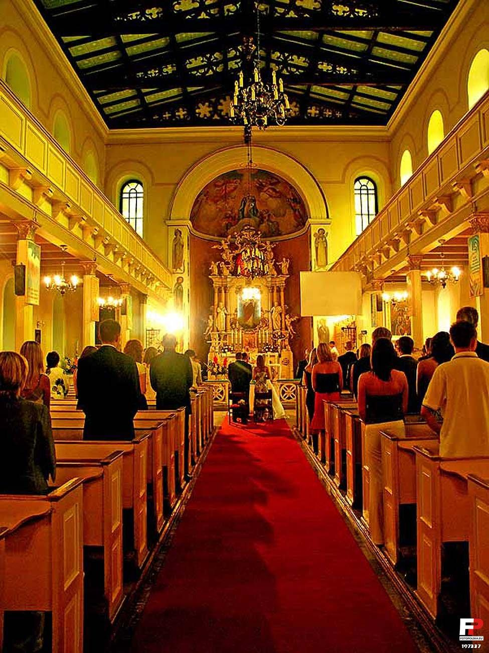 Wnętrze kościoła w sztucznym oświetleniu.